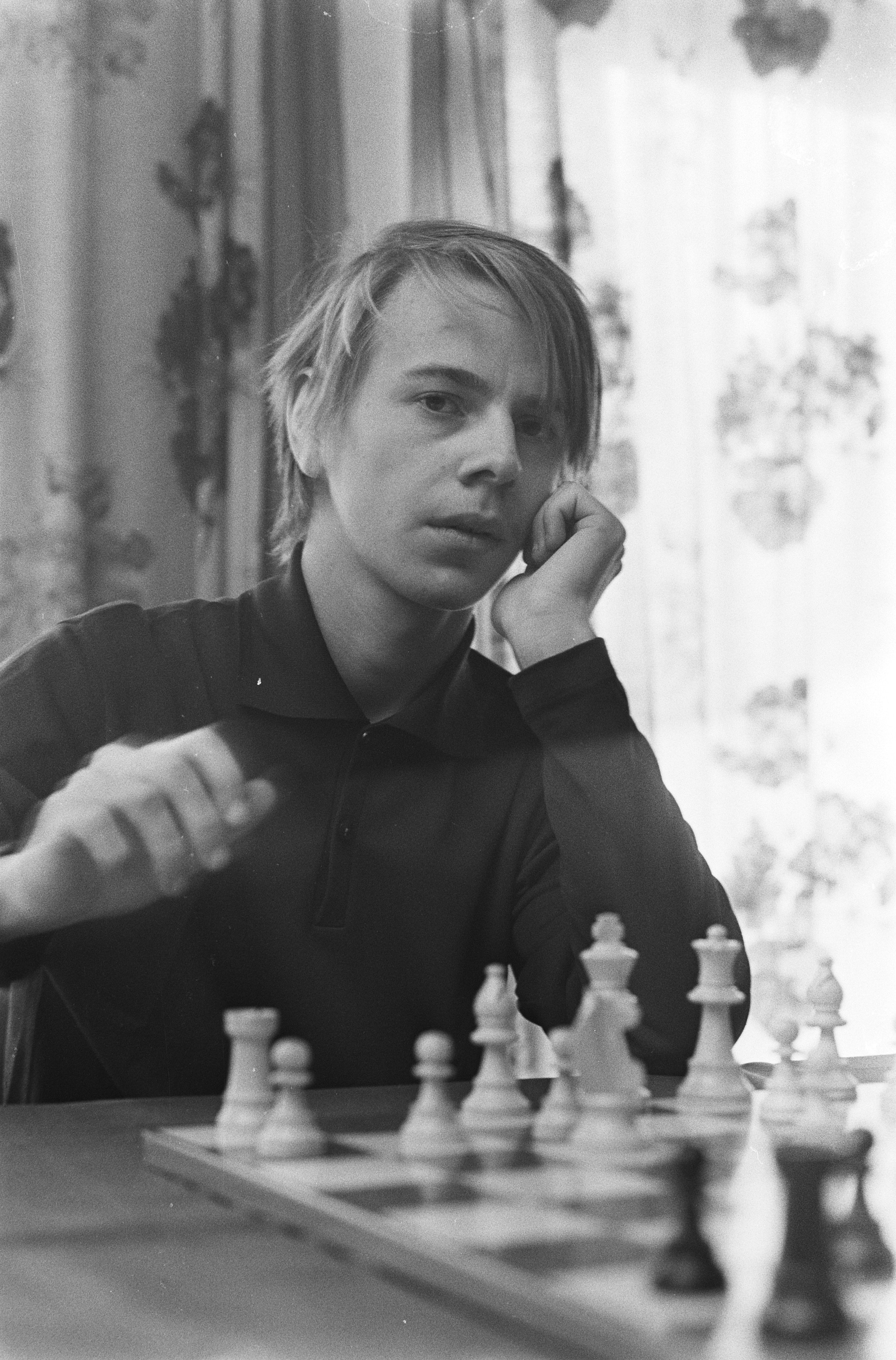 Collectie / Archief : Fotocollectie Anefo Reportage / Serie : [ onbekend ] Beschrijving : Hoogovenschaaktoernooi, Wijk aan Zee ; nr. 13: Gligoric, kop, in aktie, nr. 14, 15: Andersson, kop, in aktie, nr. Hort, kop, in aktie / Datum : 12 januari 1971 Locatie : Noord-Holland, Wijk aan Zee Trefwoorden : schaken Persoonsnaam : Andersson Fotograaf : Verhoeff, Bert / Anefo Auteursrechthebbende : Nationaal Archief Materiaalsoort : Negatief (zwart/wit) Nummer archiefinventaris : bekijk toegang 2.24.01.05 Bestanddeelnummer : 924-1691